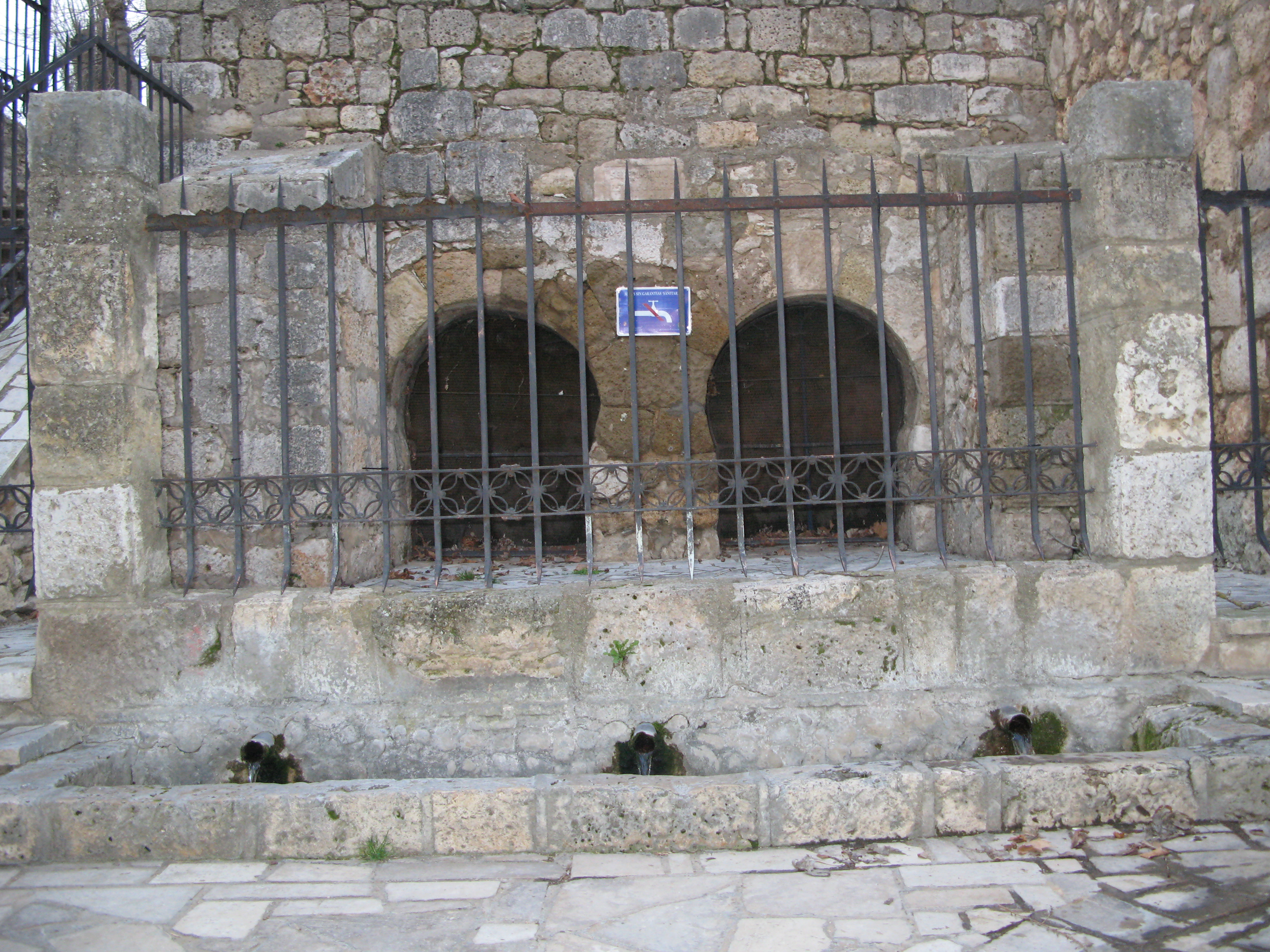 FUENTE DE RECESVINTO O DE SAN JUAN DE BAÑOS